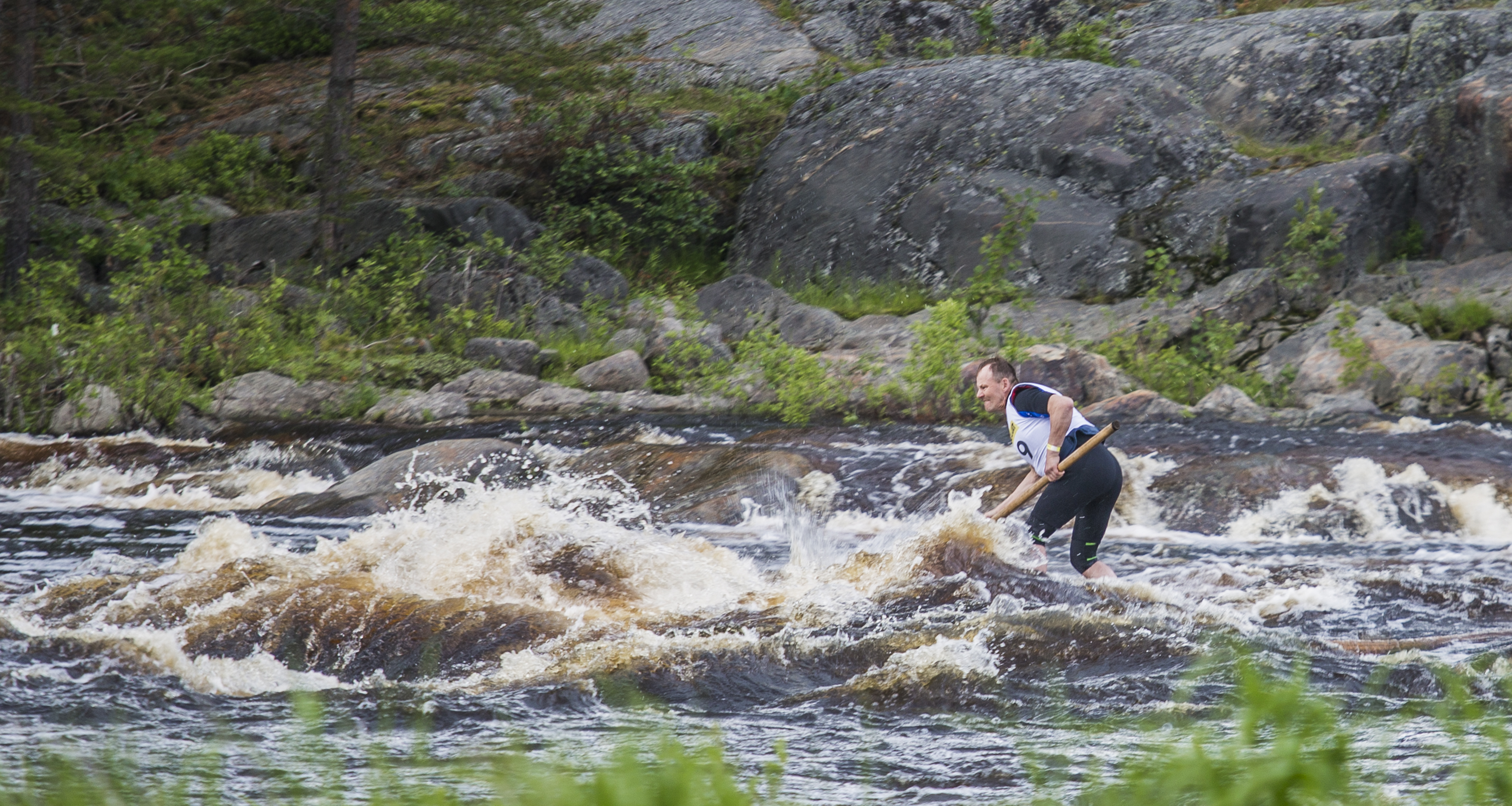 Tukkilaiskisat Iissa Raasakkakoskella 4.7.2015